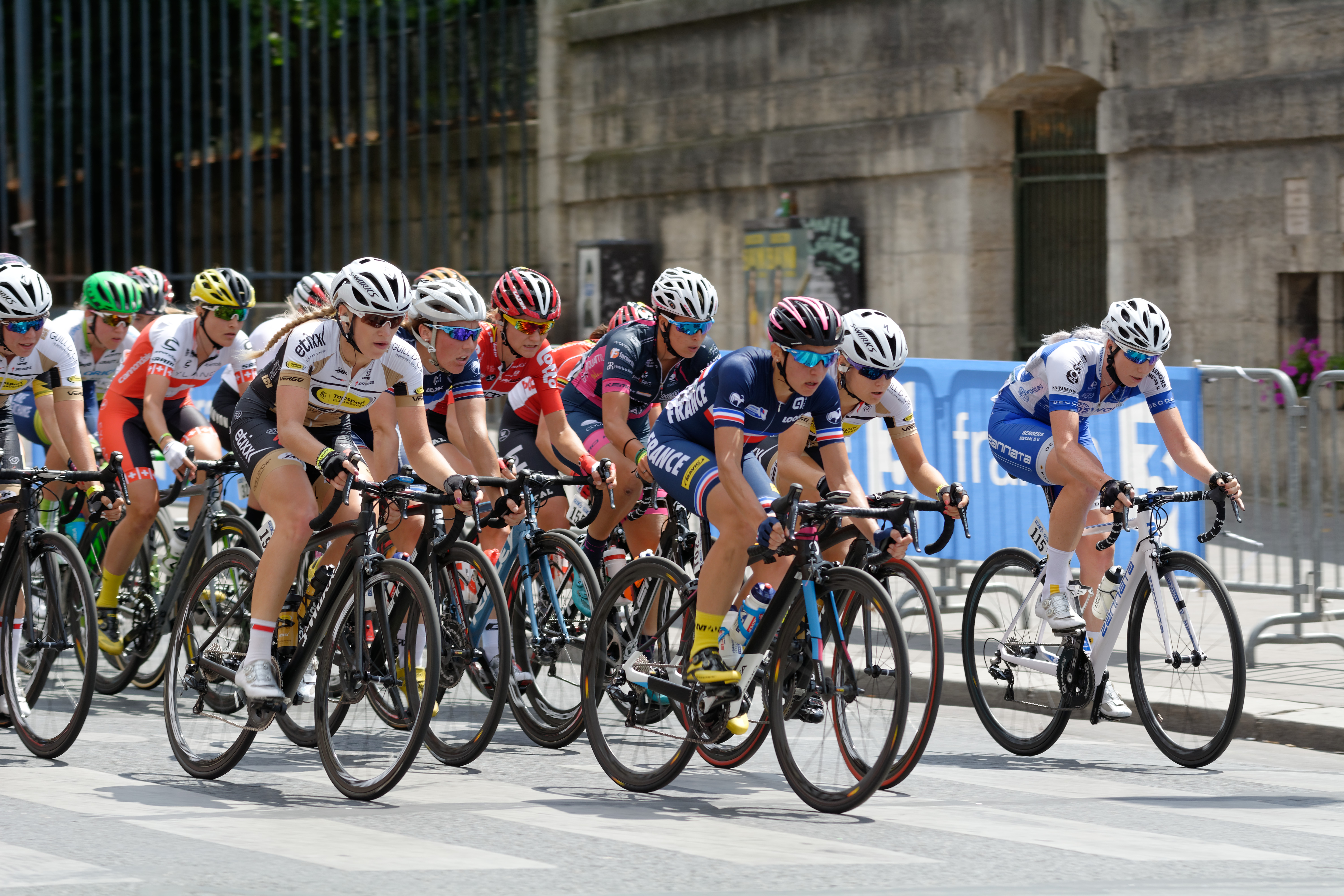 D71_9228_DxO